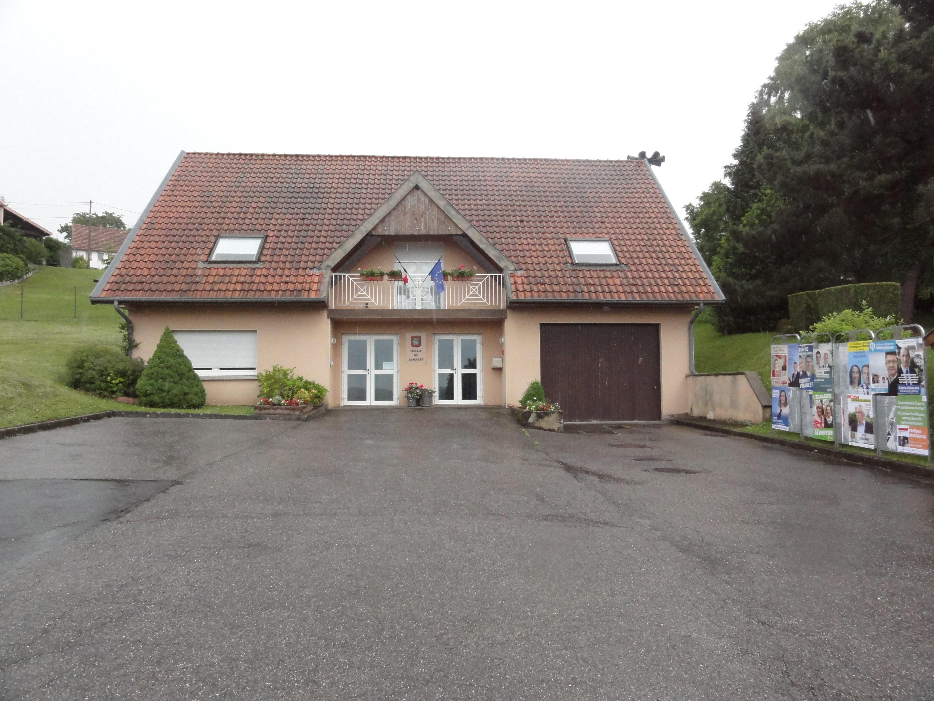 Hommert (Moselle) mairie